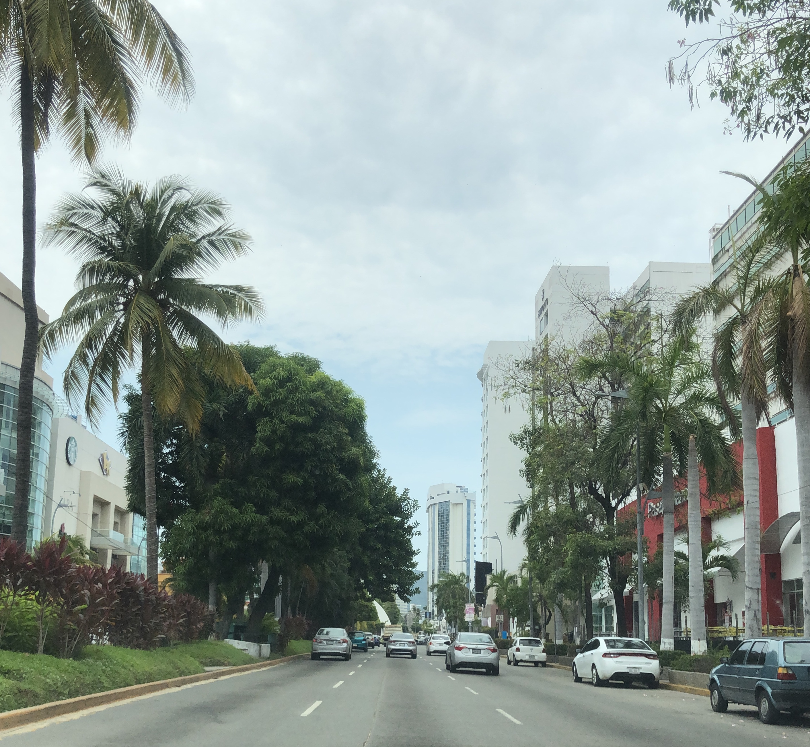 Costera Miguel Alemán Acapulco